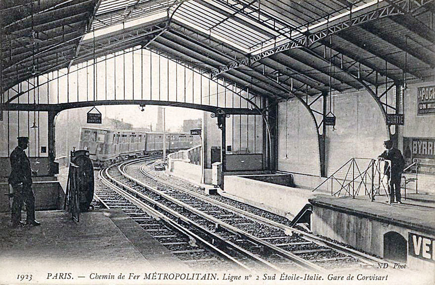 Paris - Chemin de fer métropolitain - Ligne 2 Sud Étoile-Italie - Gare de Corvisart.